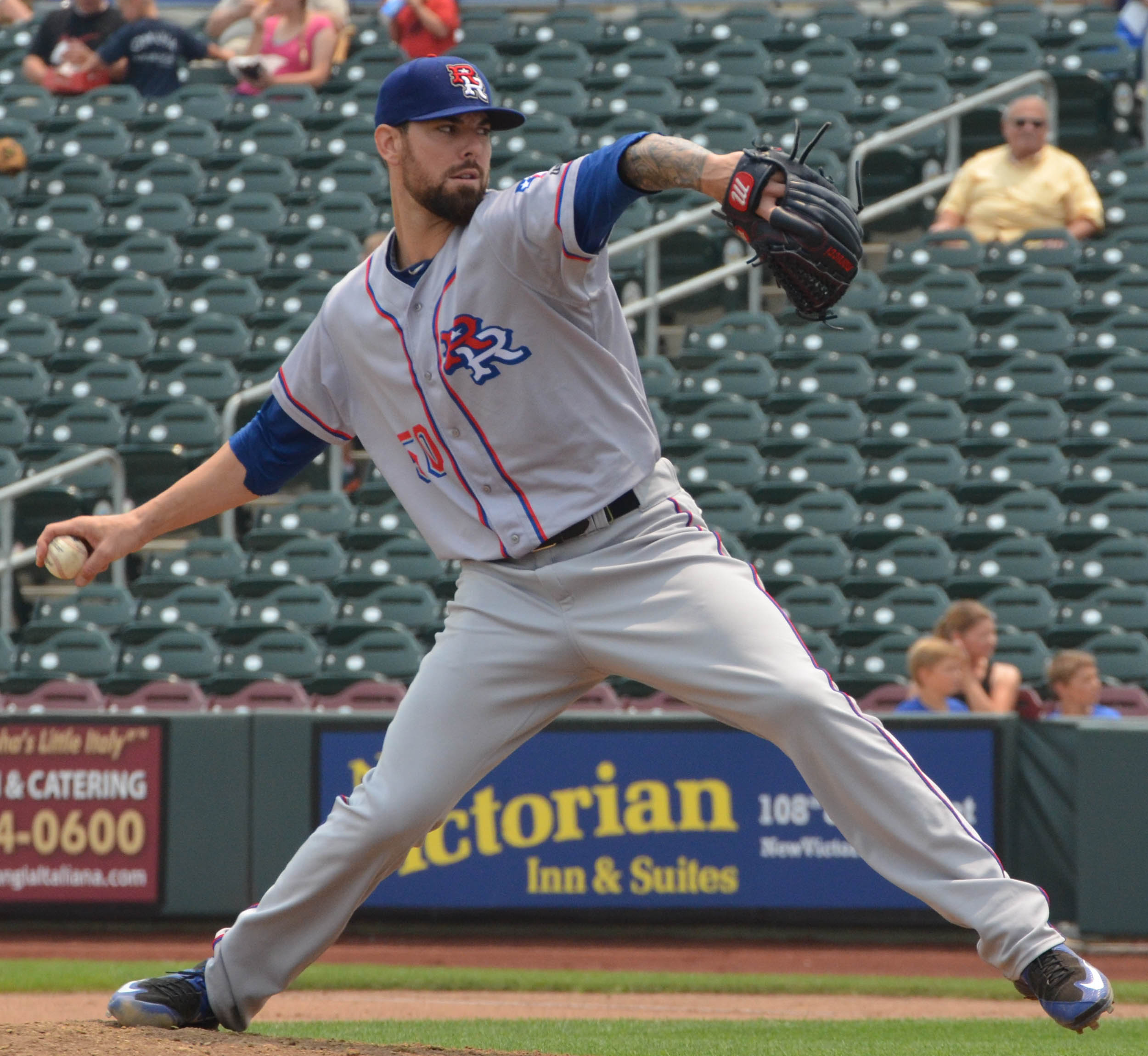 Anthony Ranaudo